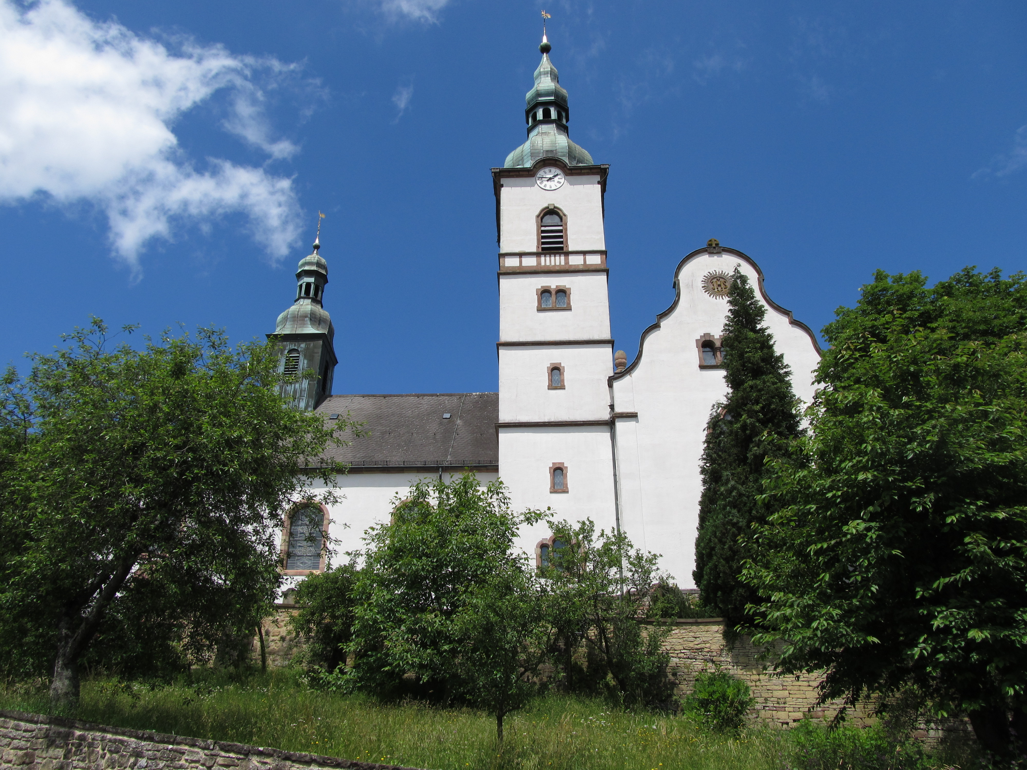 Die St. Peterskirche in Ensheim, Saarland